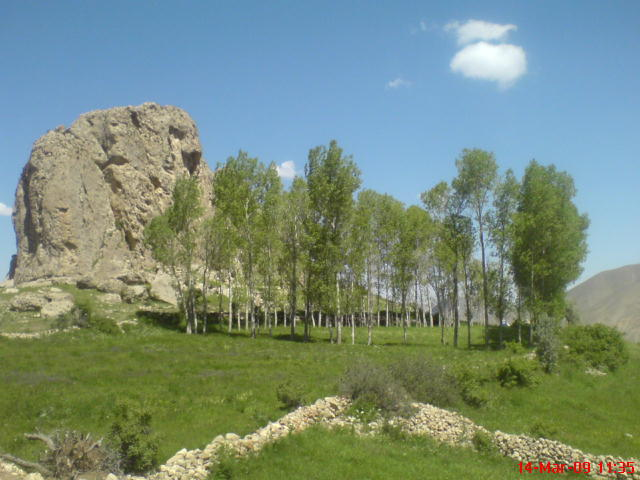 باللی قیه